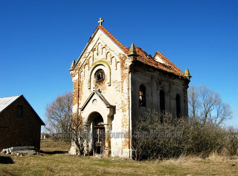 Костел Опіки Найсвятішої Панний Марії (1899р.) с.Горпин. Сучасний стан. Фото: березень, 2011